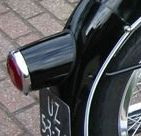 Berenlul (BMW R 50/2 1964). Bijnaam voor de cilindrische achterlichten van oude BMW-motorfietsen.